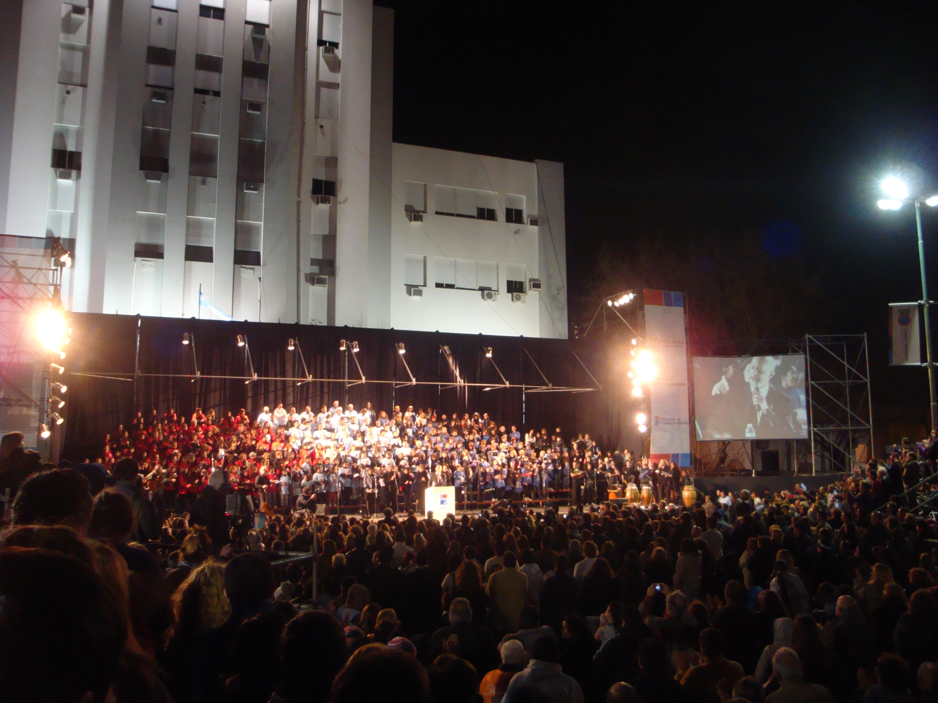 Acto por el 150º aniversario de la fundación del Partido de Lomas de Zamora. Vista del escenario emplazado detrás del edificio municipal.